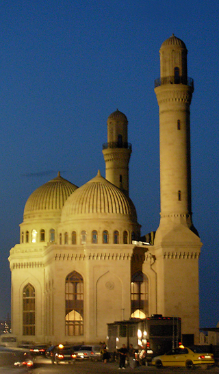 Мечеть Биби-Эйбат, Баку, Азербайджан